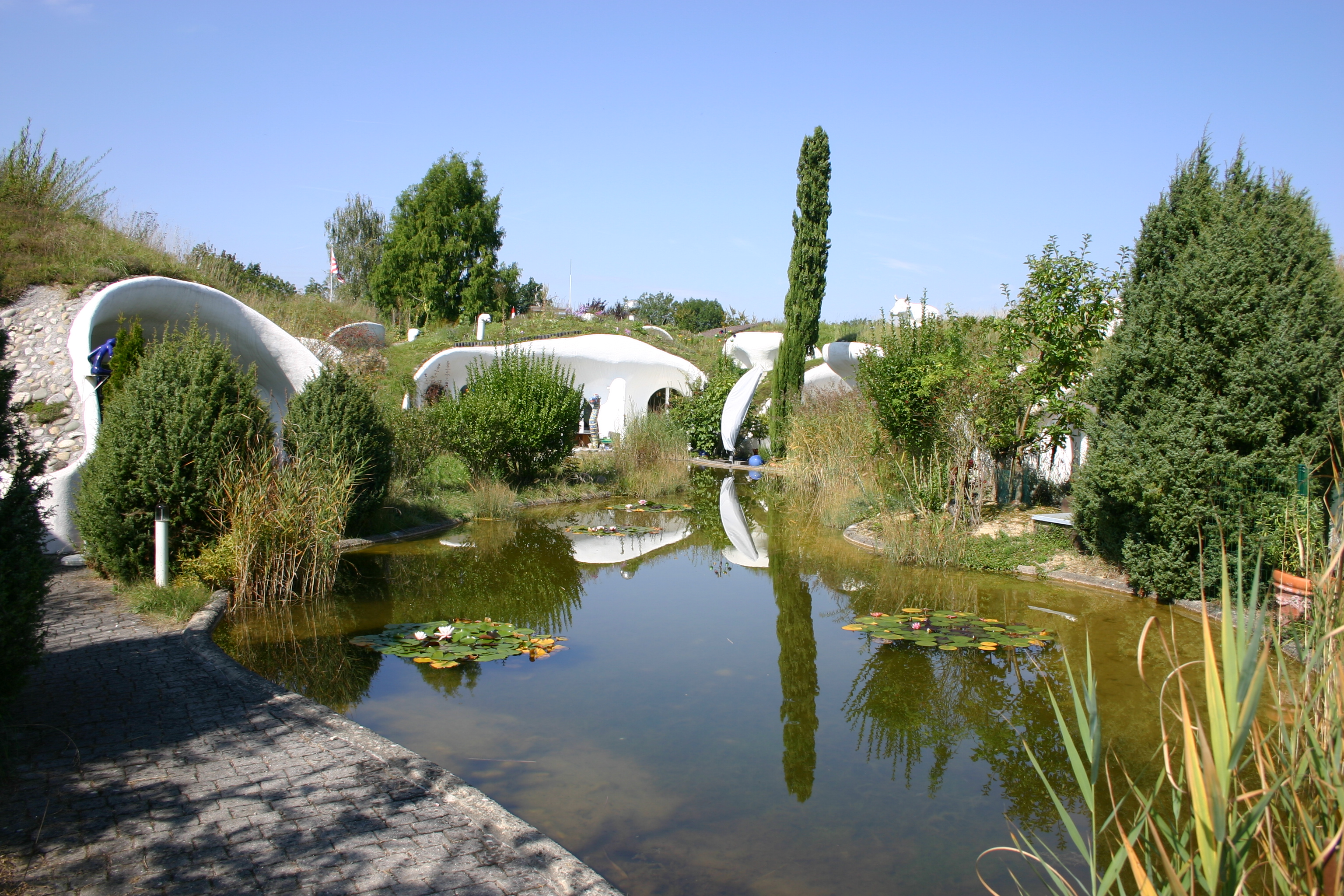 Earth house estate in Dietikon, Switzerland, built by Peter Vetsch